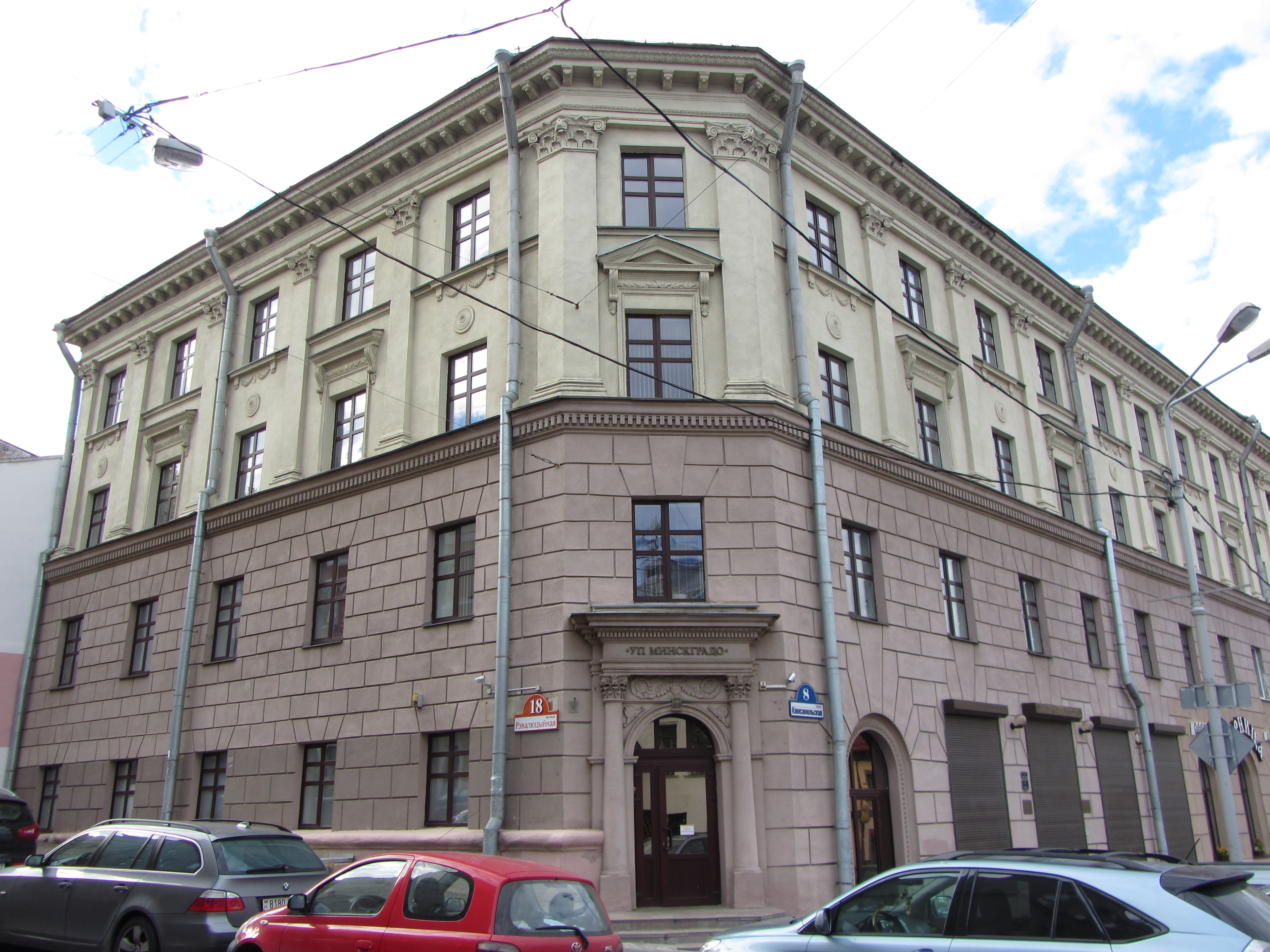 Беларуская (тарашкевіца): Камсамольская 8, Менск